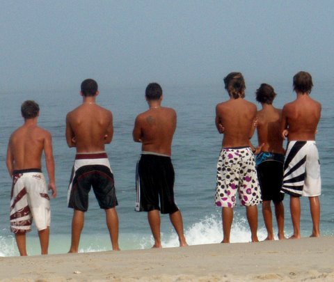 surf trunks